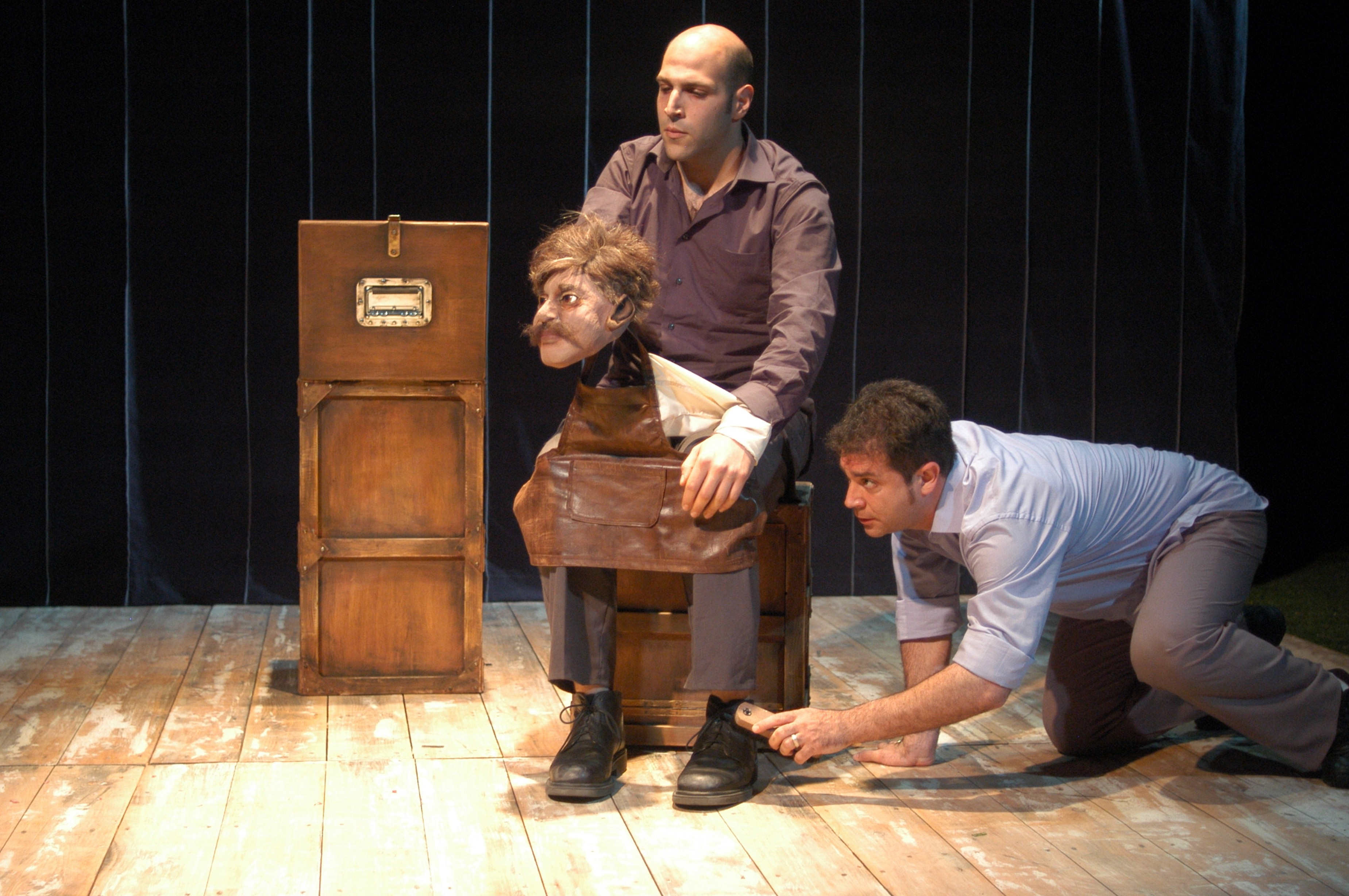 ההצגה "המוות ישב לידי", בבימויה של מור פרנק, תיאטרון החאן